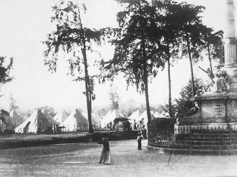 Campamento de afectados por los terremotos de 1917-18.